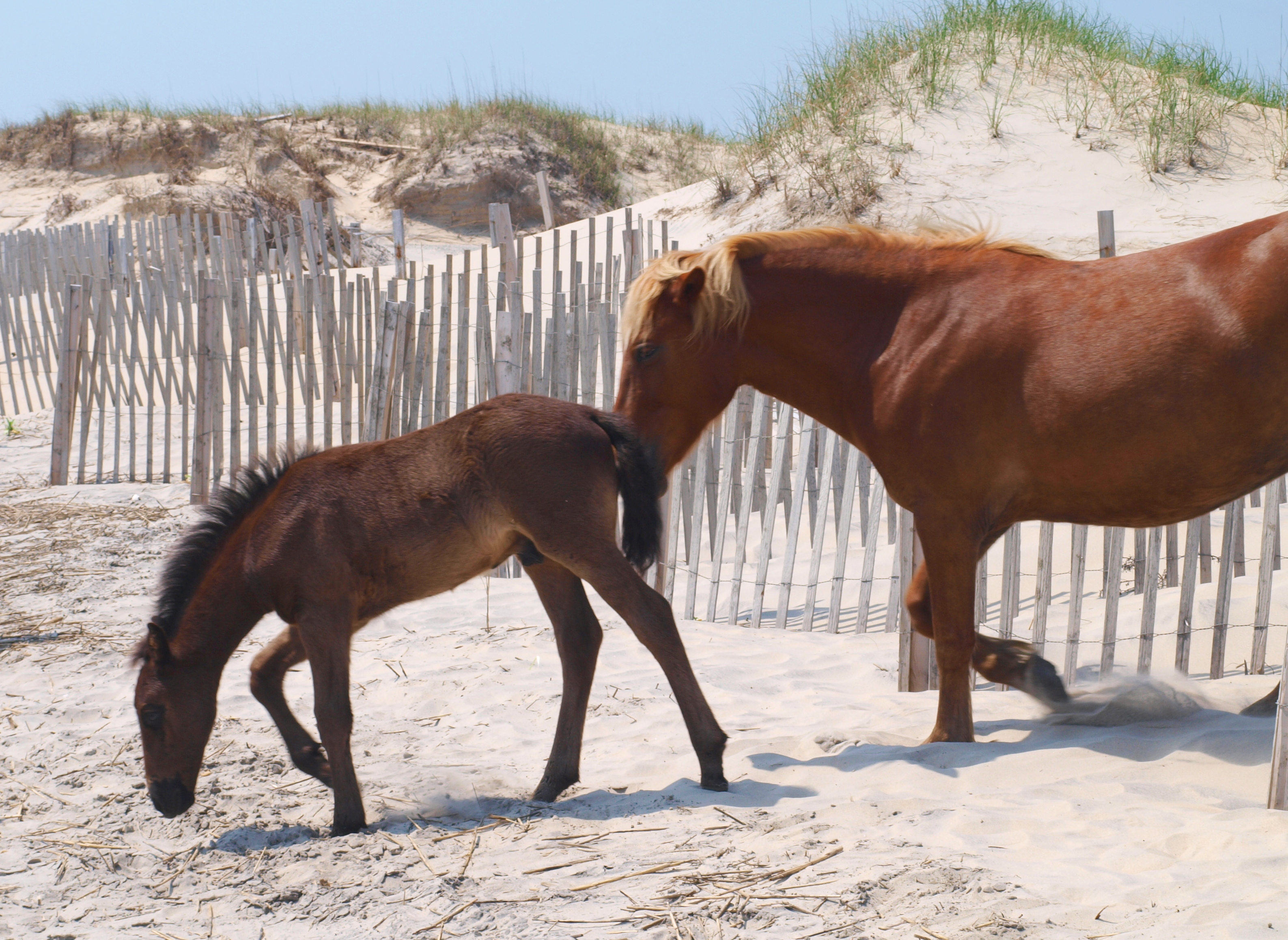 Banker horses